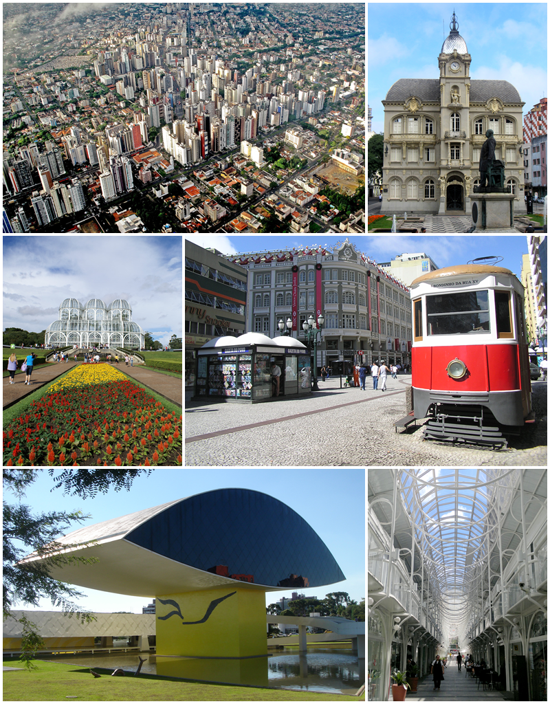 Montage fotográfico de Curitiba, capital del estado de Paraná.